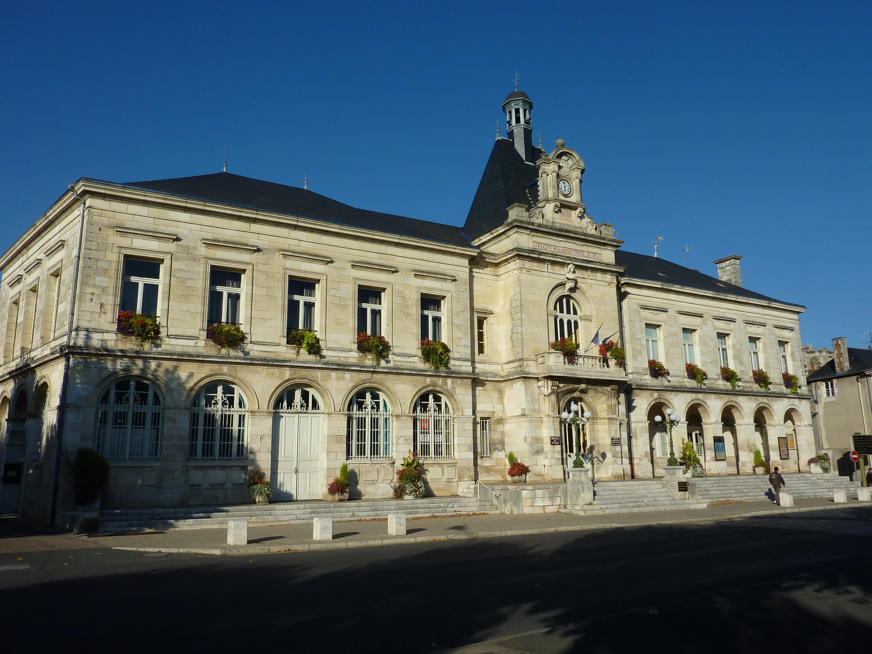 Mairie de Chauvigny (Vienne, France)